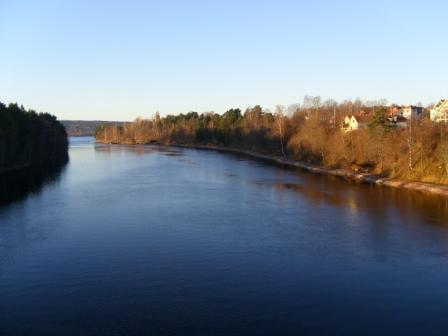 Österdalälven sedd från Leksandsbron med Siljan i bakgrunden